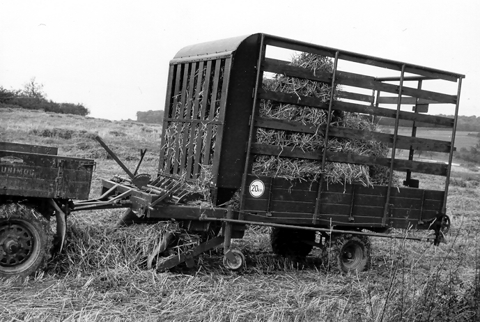 Test (Beladen) des Prototyps des Futter-Lade- und Transportgerätes (Ladewagen) von Ernst Weichel